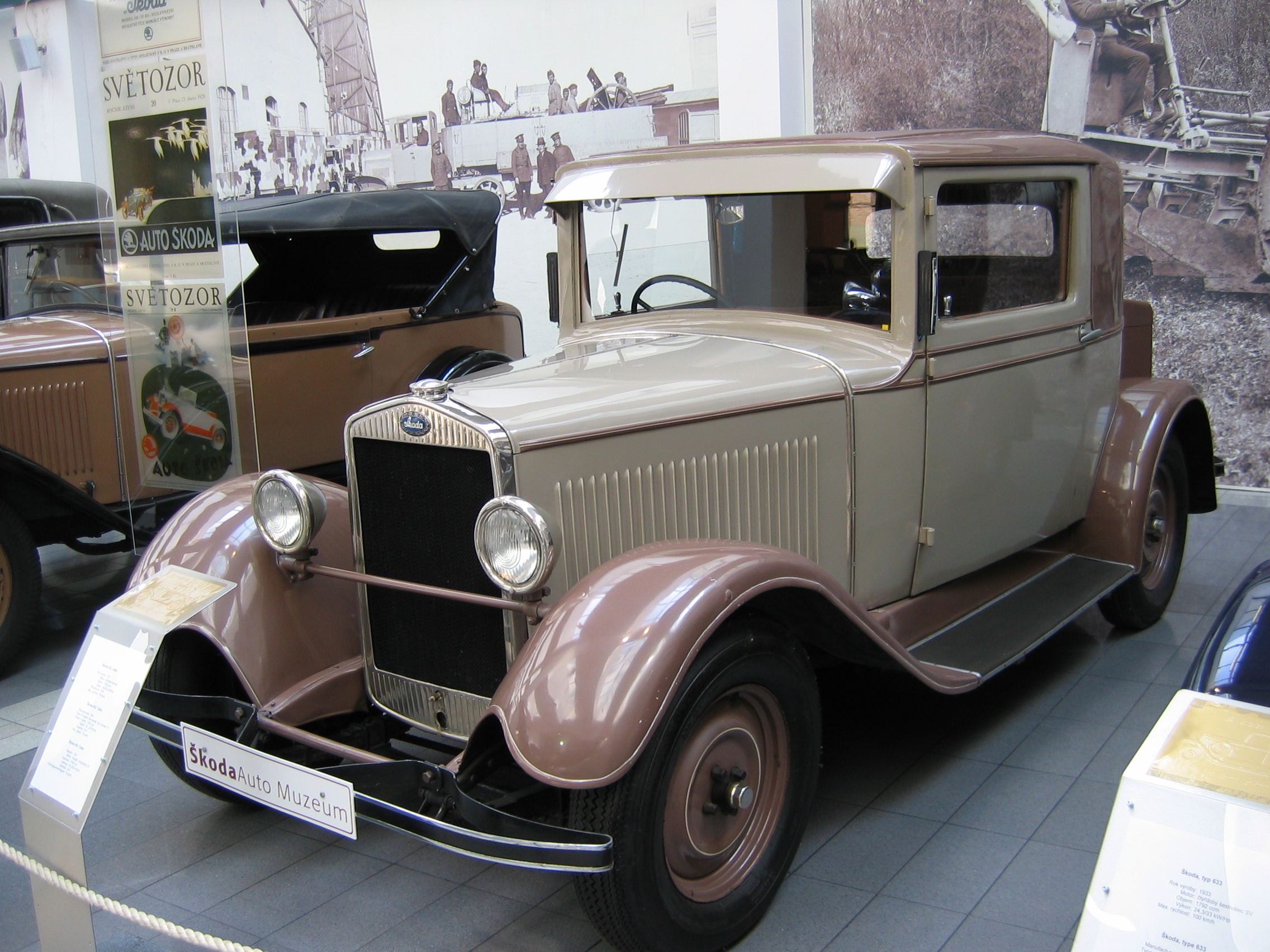 Škoda 422 Tudor - Škoda Auto Museum, Mlada Boleslav